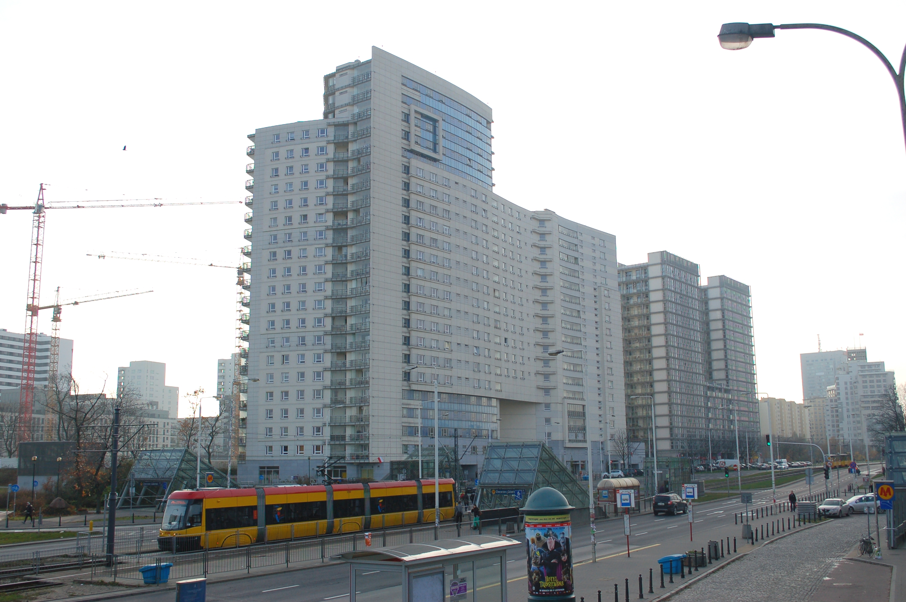 5 and 7, Slominski street in Warsaw